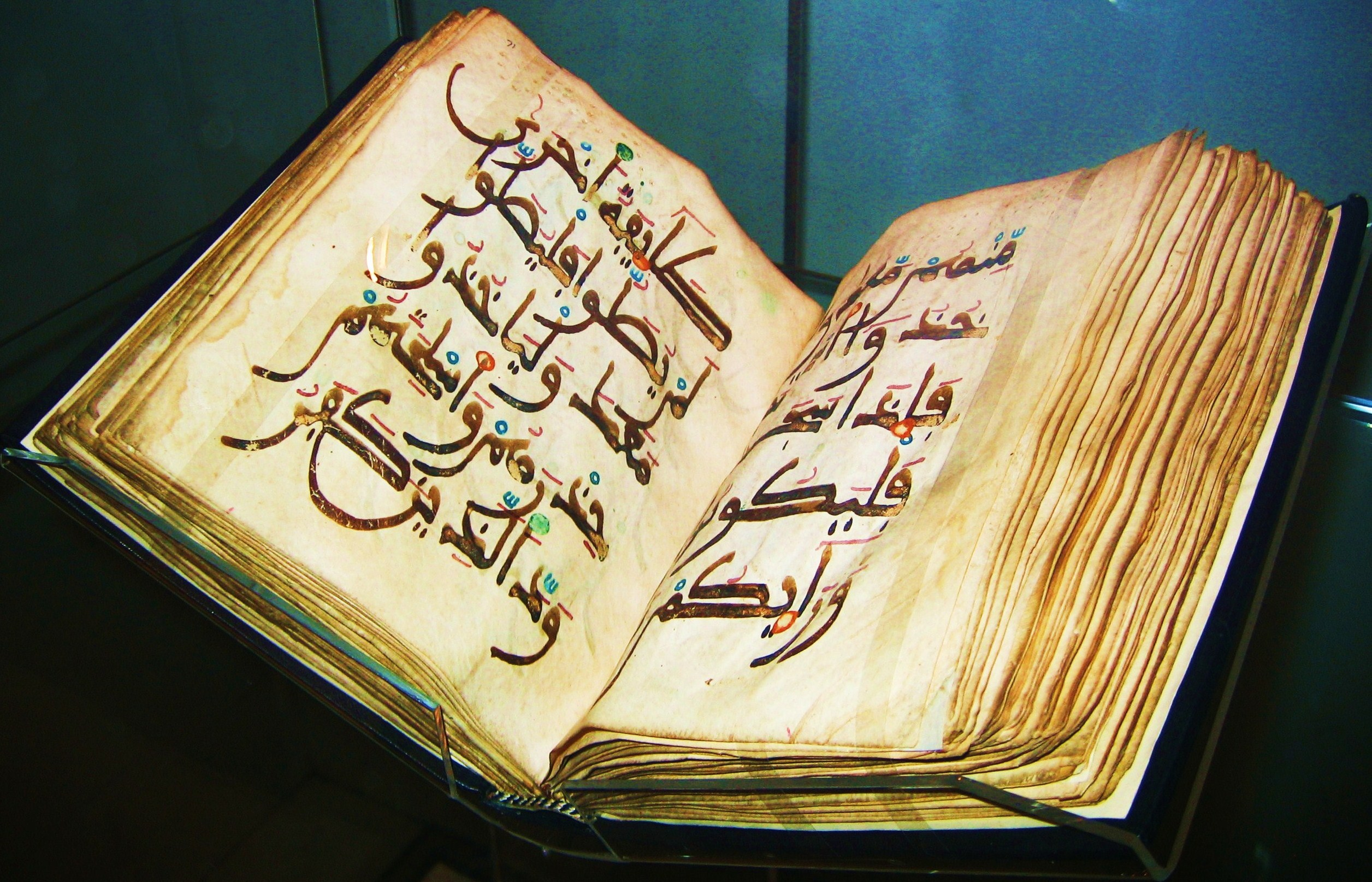 یک جلد قرآن متعلق به سده اول هجری. واقع در بخش اسلامی موزه بریتانیا.